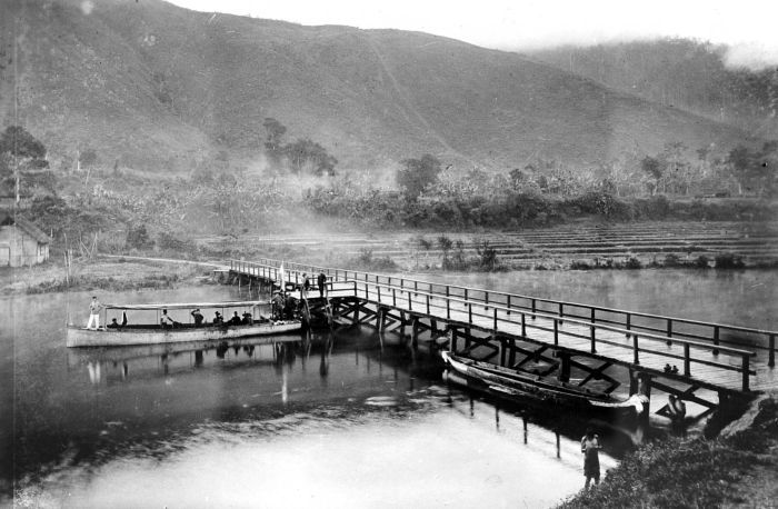 Repronegatief. Een motorboot met passagiers bij een brug over de rivier Peusangan op de Gajoweg aan de Noordkust van Atjeh, Sumatra